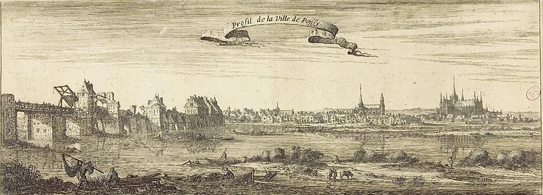 Profil de Poissy vu de Carrières-sous-Poissy. De gauche à droite l'ancien pont de Poissy avec son pont levis et ses moulin, la collégiale Notre-Dame de Poissy et le prieuré Saint-Louis de Poissy.